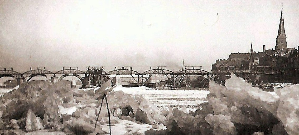 Bevroren Maas in Maastricht met St. Servaasbrug in restauratie. 1933-01-28. Foto uit familie archief.